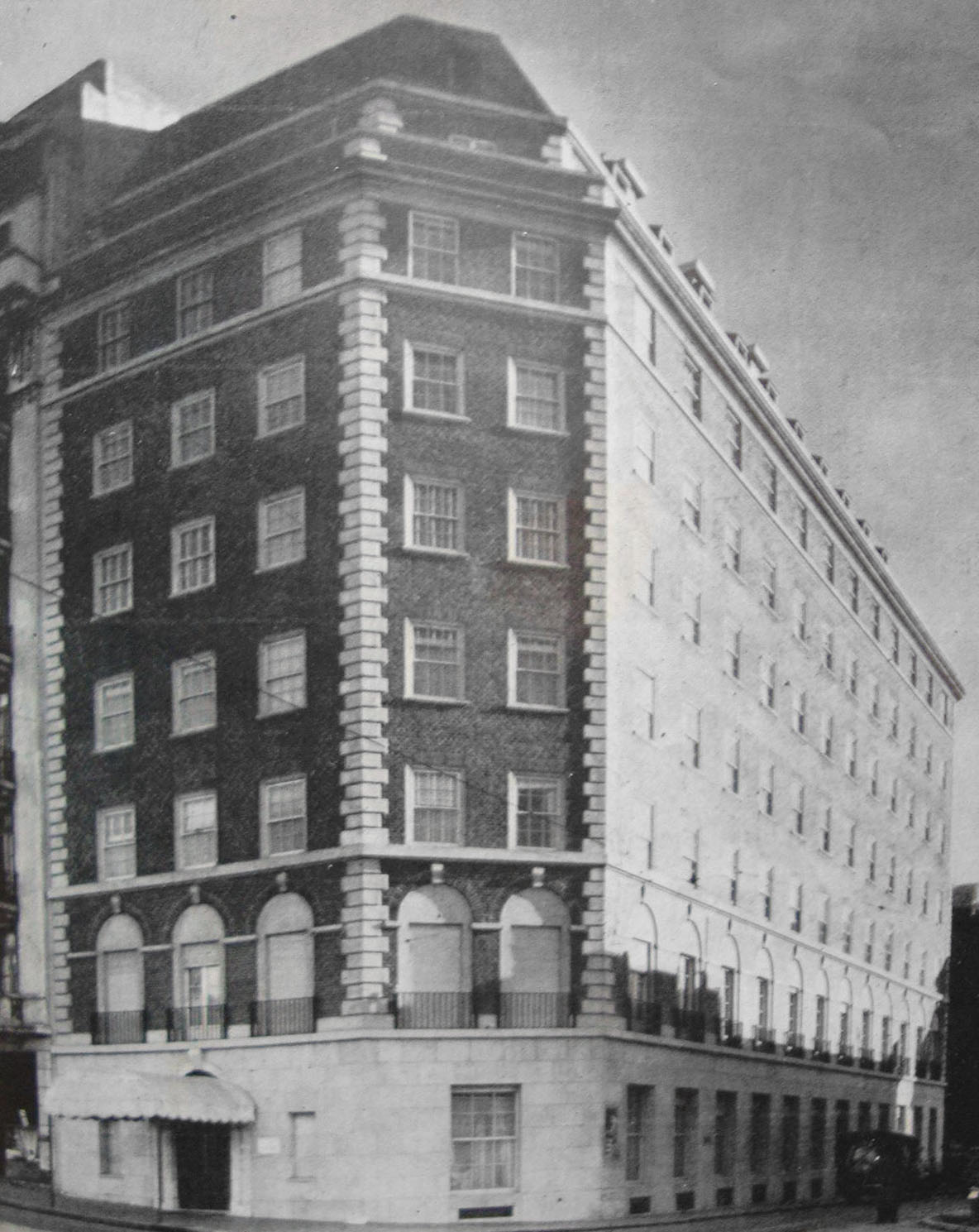 Lancaster Hotel, proyectado por los arquitectos Acevedo, Becú y Moreno. Avenida Córdoba 405 (esquina Reconquista), Buenos Aires, Argentina.